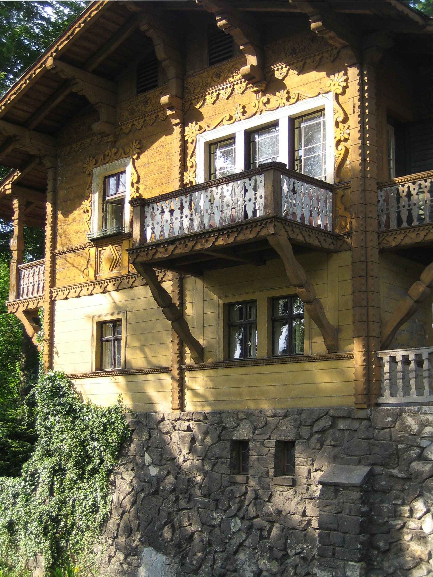 Klein-Glienicke bei Berlin. Haus im "alpenländischen Stil", ein so genanntes "Schweizerhaus" aus dem 19. Jahrhundert.